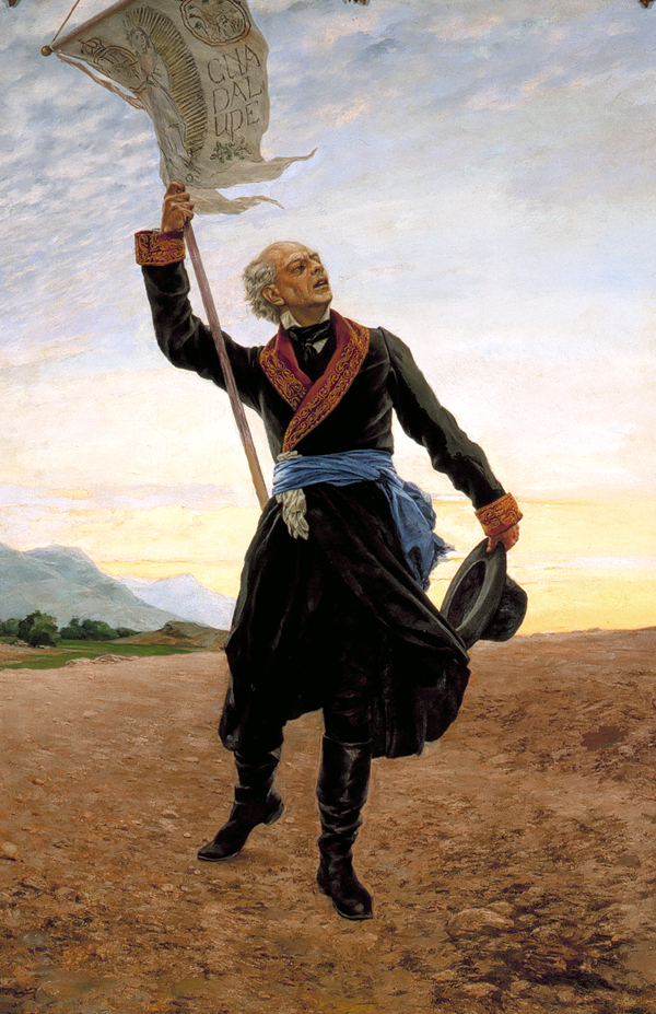 Miguel Hidalgo (1753-1811)